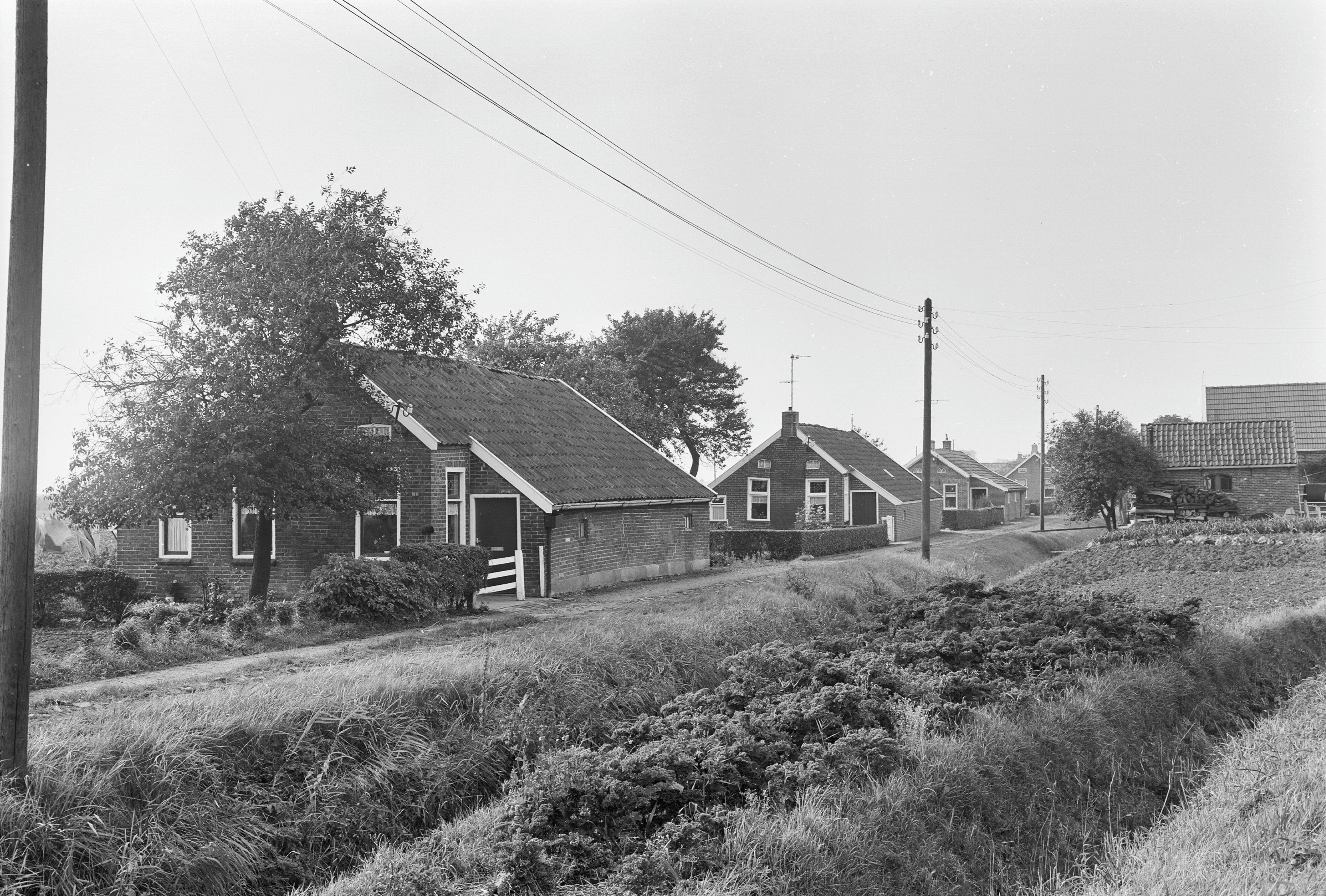 overzicht